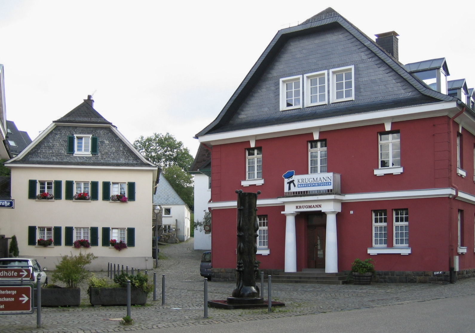 „Krugmann-Häuser“ Krim 3 (links) und Krim 2 (rechts) in Meinerzhagen. This image shows a heritage building in Germany, located in the North Rhine-Westphalian city Meinerzhagen (no. 22).